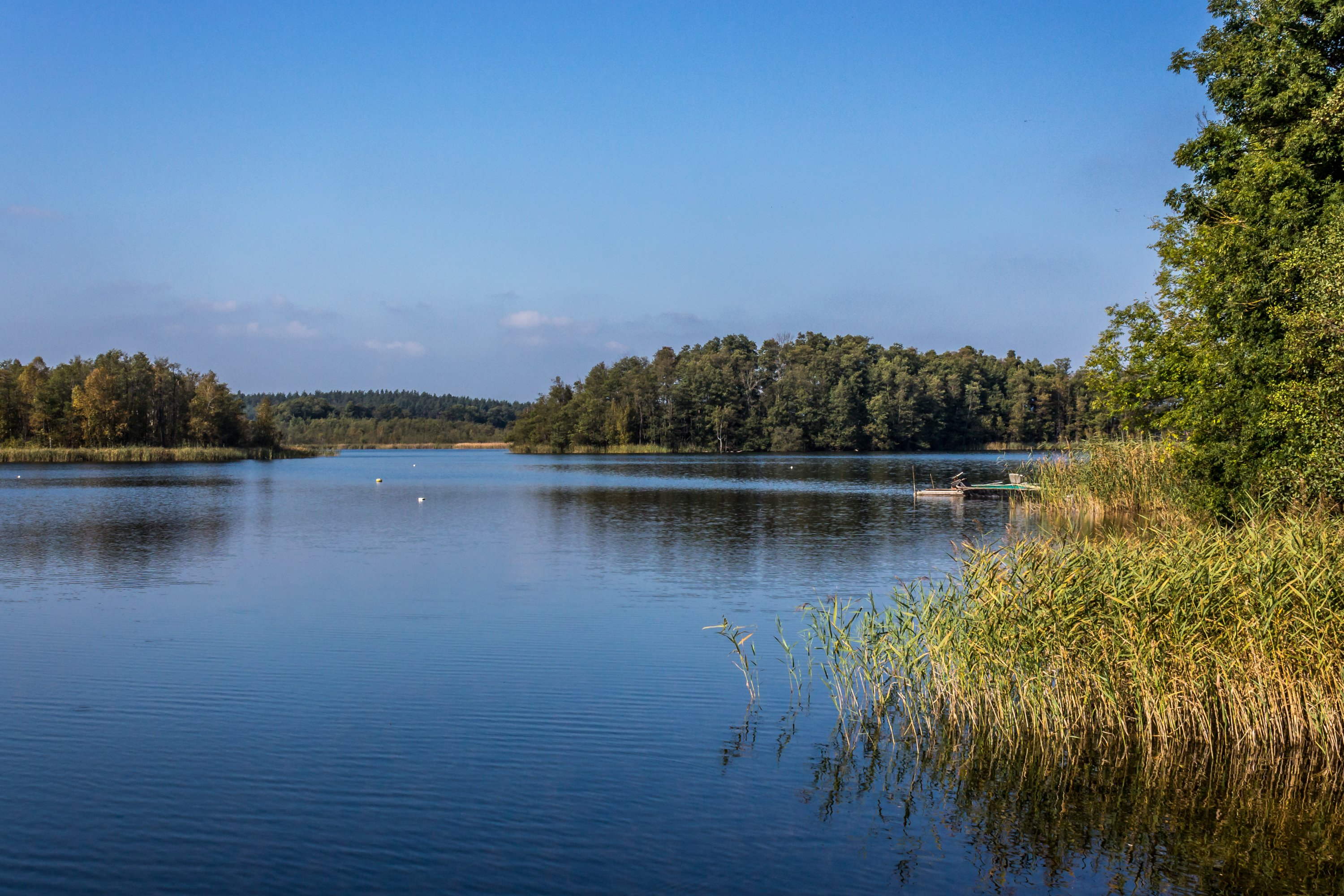 Kölpinsee nördlich von Götschendorf